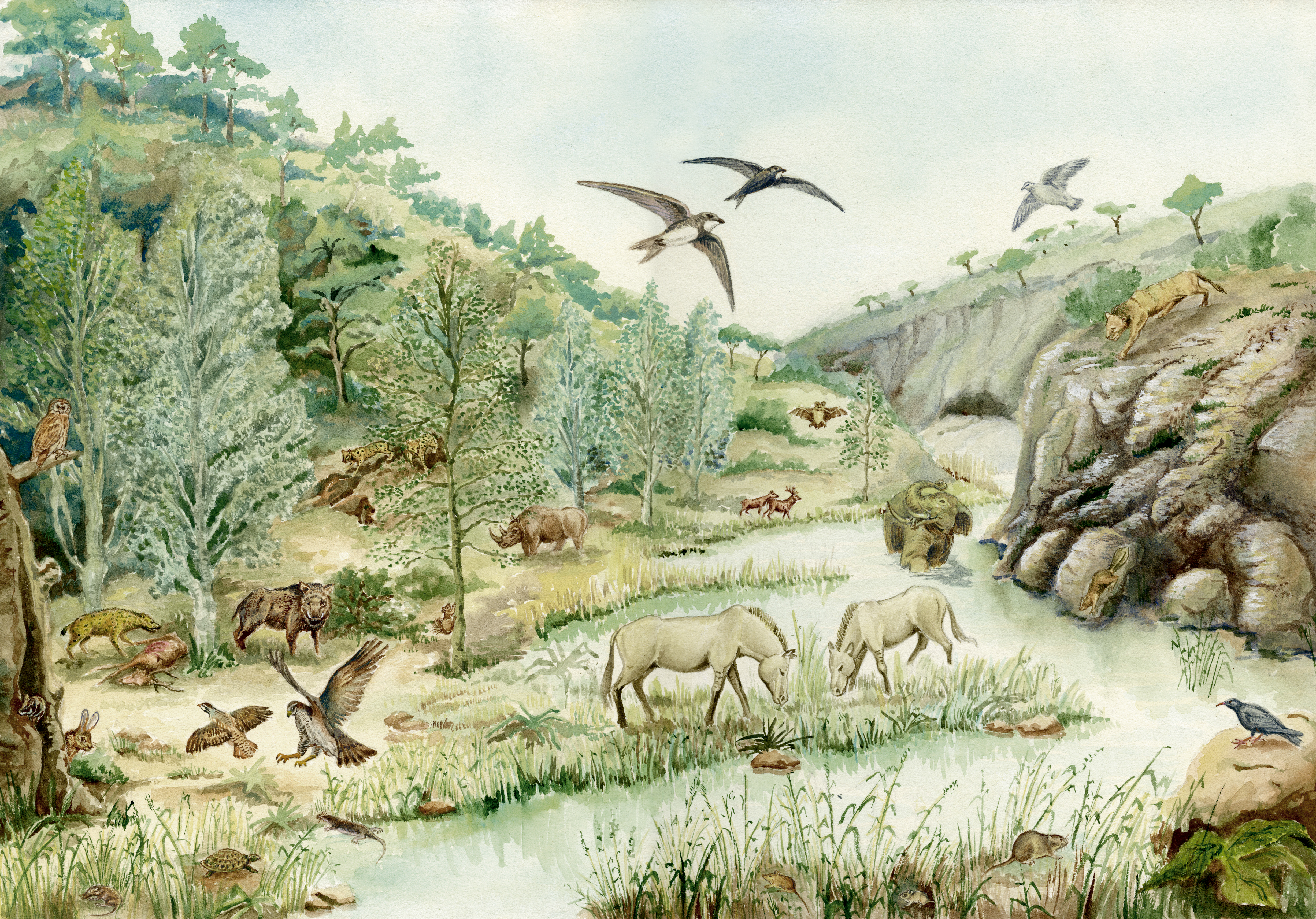 Paisatge amb la Fauna que hi havia a la Cova Negra al Paleolític mitjà (F. Chiner)